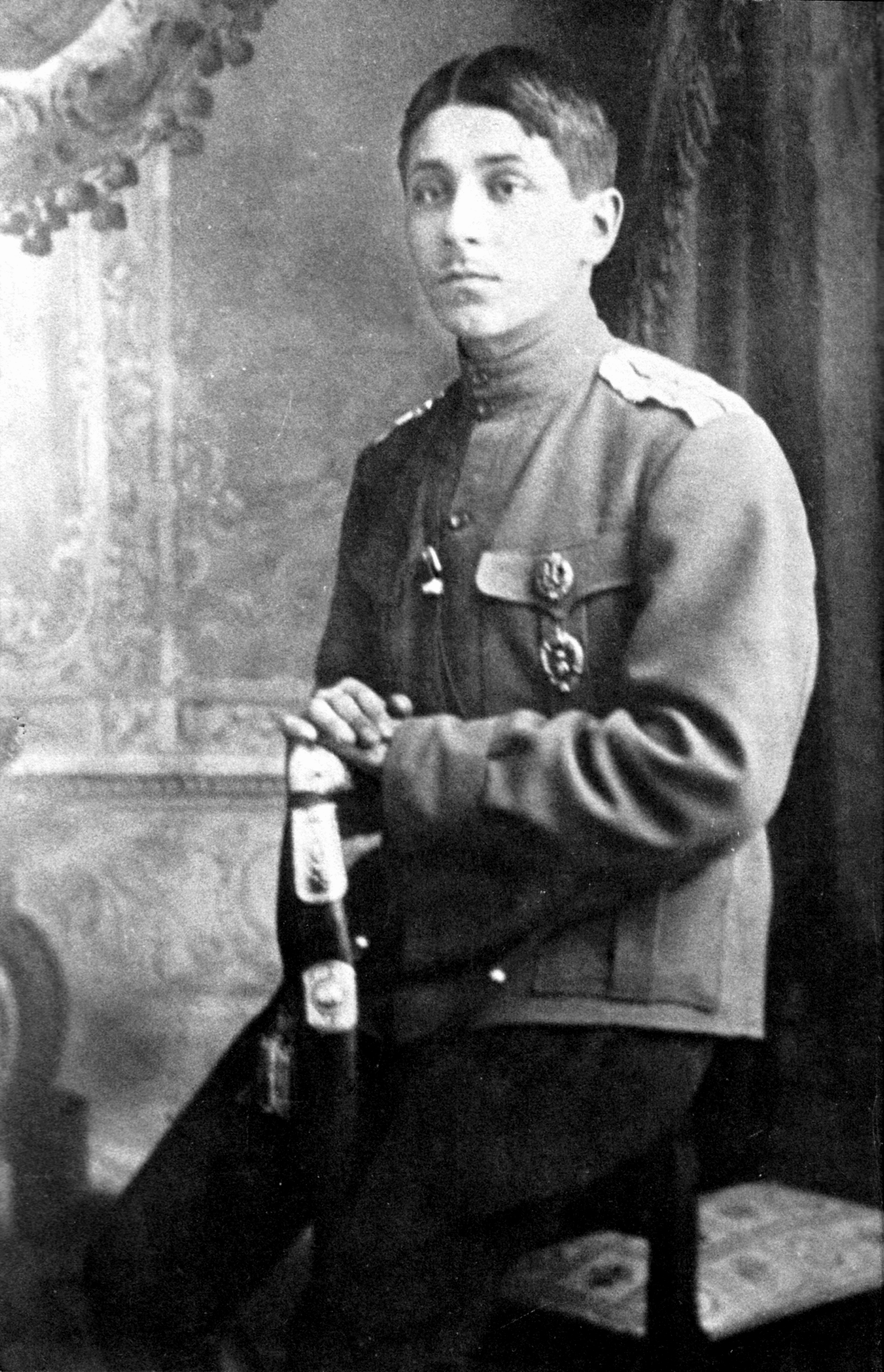 прапорщик Зощенко